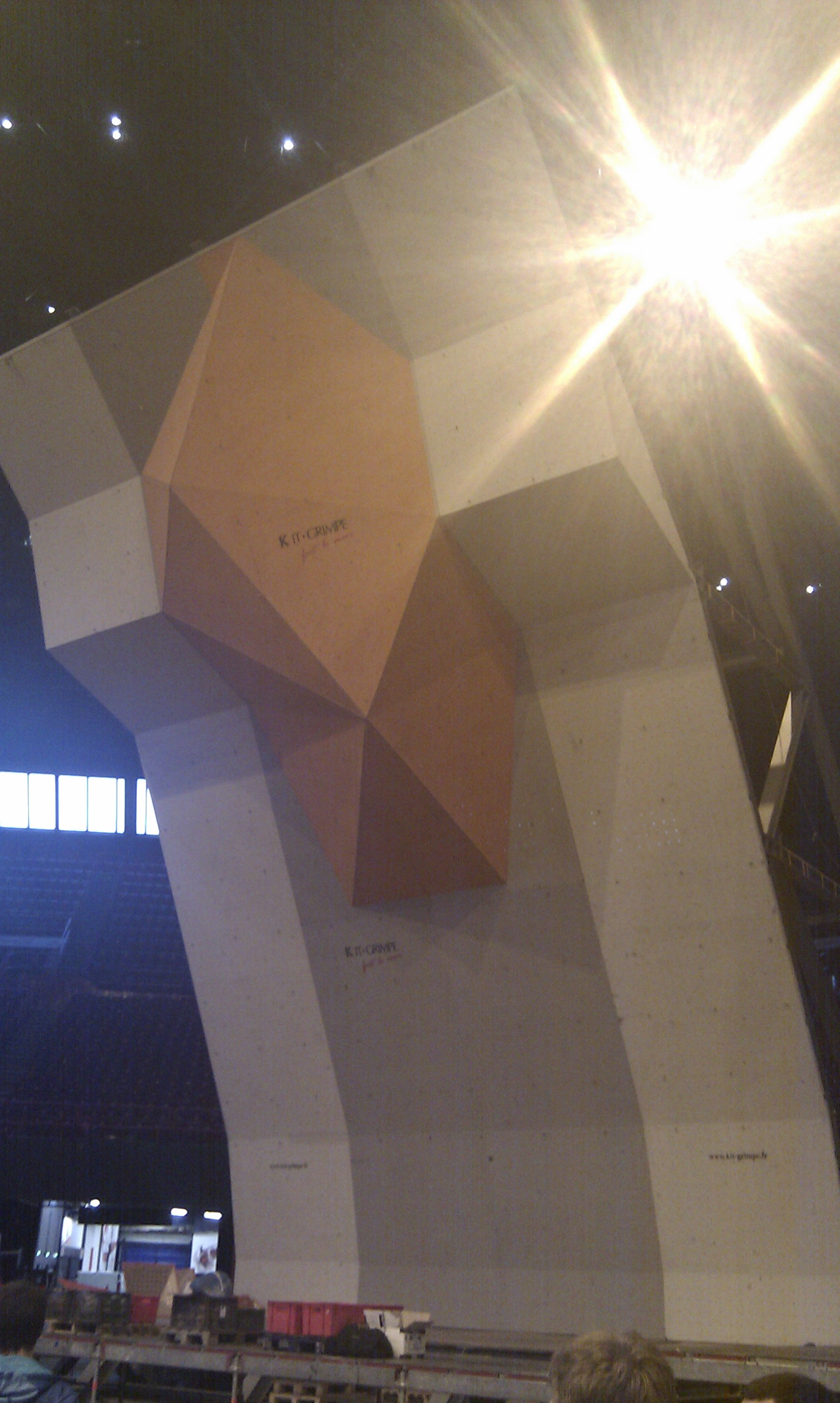 Mur d'escalade de difficulté, sans prise, pour les championnats du monde d'escalade de septembre 2012 à Paris-Bercy.